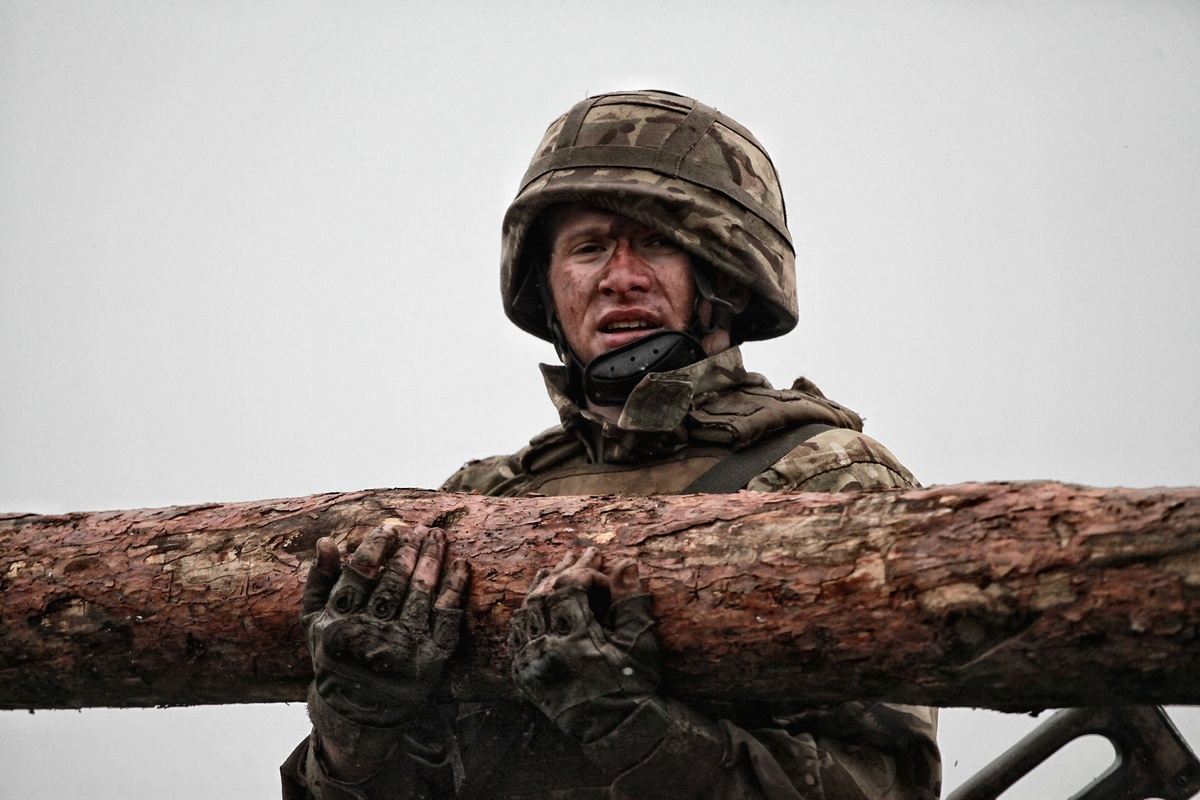 Морпіхи з 1-го Феодосійського батальйону морської піхоти імені Костянтина Ольшанського склали клятву морського піхотинця та отримали чорні берети. Урочиста подія відбулася у центрі Миколаєва біля пам’ятника десантникам Костянтина Ольшанського та була приурочена до Дня морської піхоти України. Усього лави морських піхотинців поповнили на 120 військовослужбовців строкової служби та контрактниками. Під час церемонії морські піхотинці вшанували пам'ять загиблих бойових побратимів на Донбасі та поклали квіти до пам’ятника морським піхотинцям з загону Костянтина Ольшанського, які віддали своє життя, визволяючи місто Миколаїв. Напередодні цієї події усі учасники церемонії пройшли важке випробування на право носіння чорного берета. Військові виконували тактичні завдання та вправи: ведення бою у засаді та наступі, рейдові дії. Вони висаджувалися на берег річки, виконували марш-кидок, відбивали напад умовного противника та проходили смугу перешкод. Морським піхотинцям доводилося діяти в умовах задимленої місцевості, долати значні фізичні перешкоди на межі людських сил, доводячи собі й своїм старшим колегам, що вони мають право носити чорний берет. Серед бійців були й представниці жіночої статі, які на рівні з чоловіками брали участь у випробуваннях. За словами командира батальйону майора Ігоря Попадюка, практично усі учасники впоралися з поставленими завданнями та пройшли цей складний тест. Ярослав Чепурний